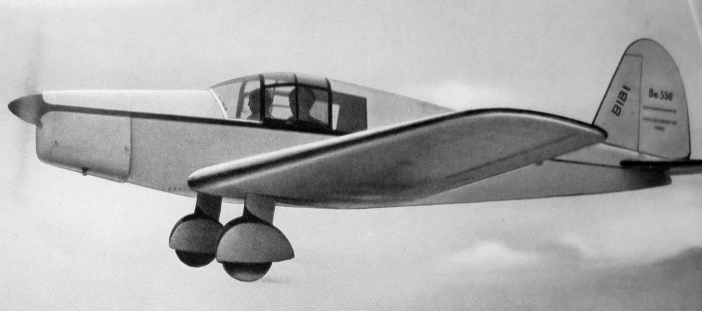 Walter Mikron a Beneš-Mráz Be-550 Bibi (1936)